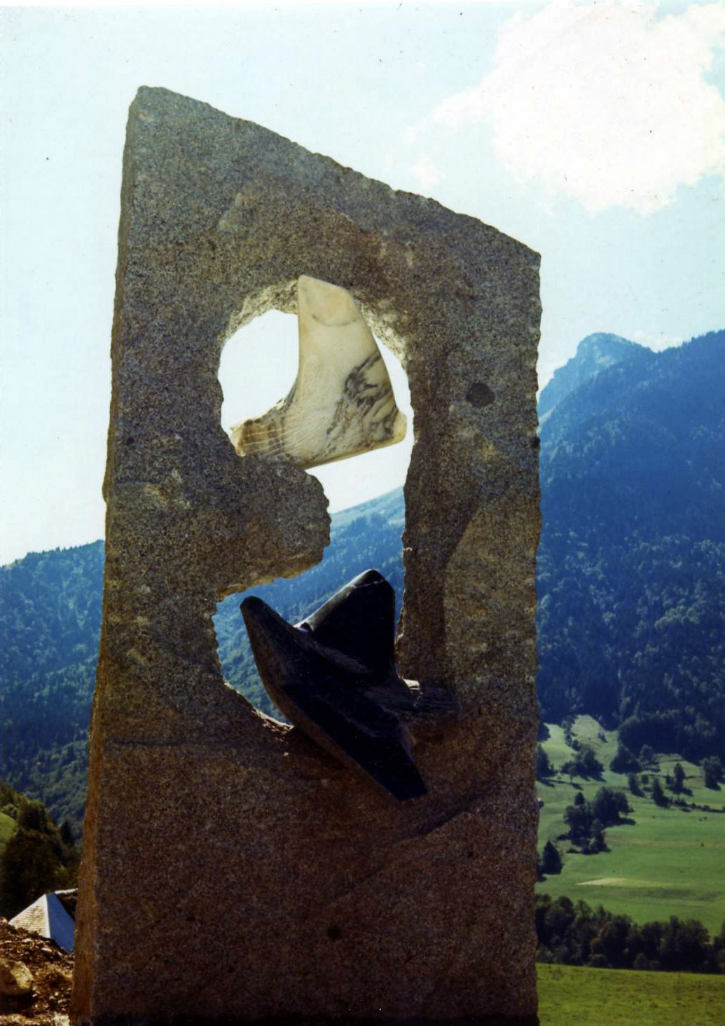 Essor, sculpture monumentale de Marcel Mayer à Le Chatelard - 74